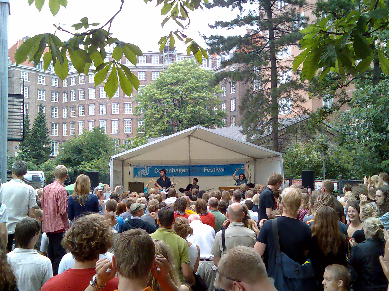 Ibrahim Electric spillede til Copenhagen Jazz Festival den 11. juli 2006 foran Pumpehuset.